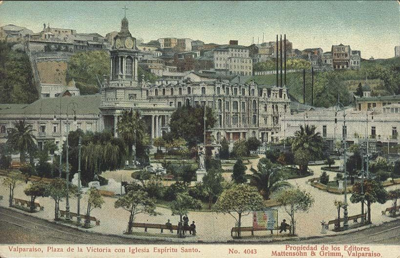 Postal que retrata la plaza Victoria antes de 1906